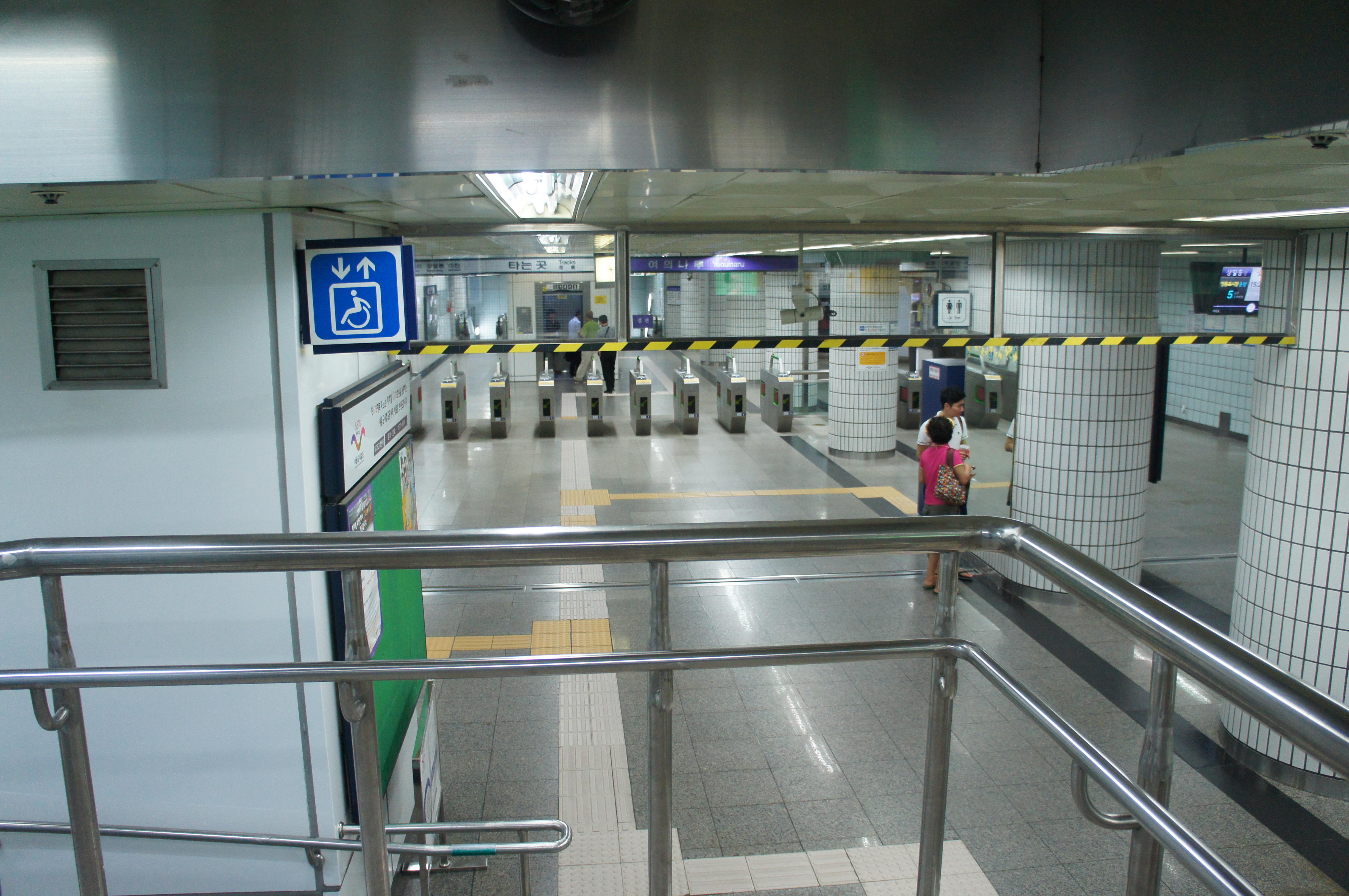 여의나루역 대합실